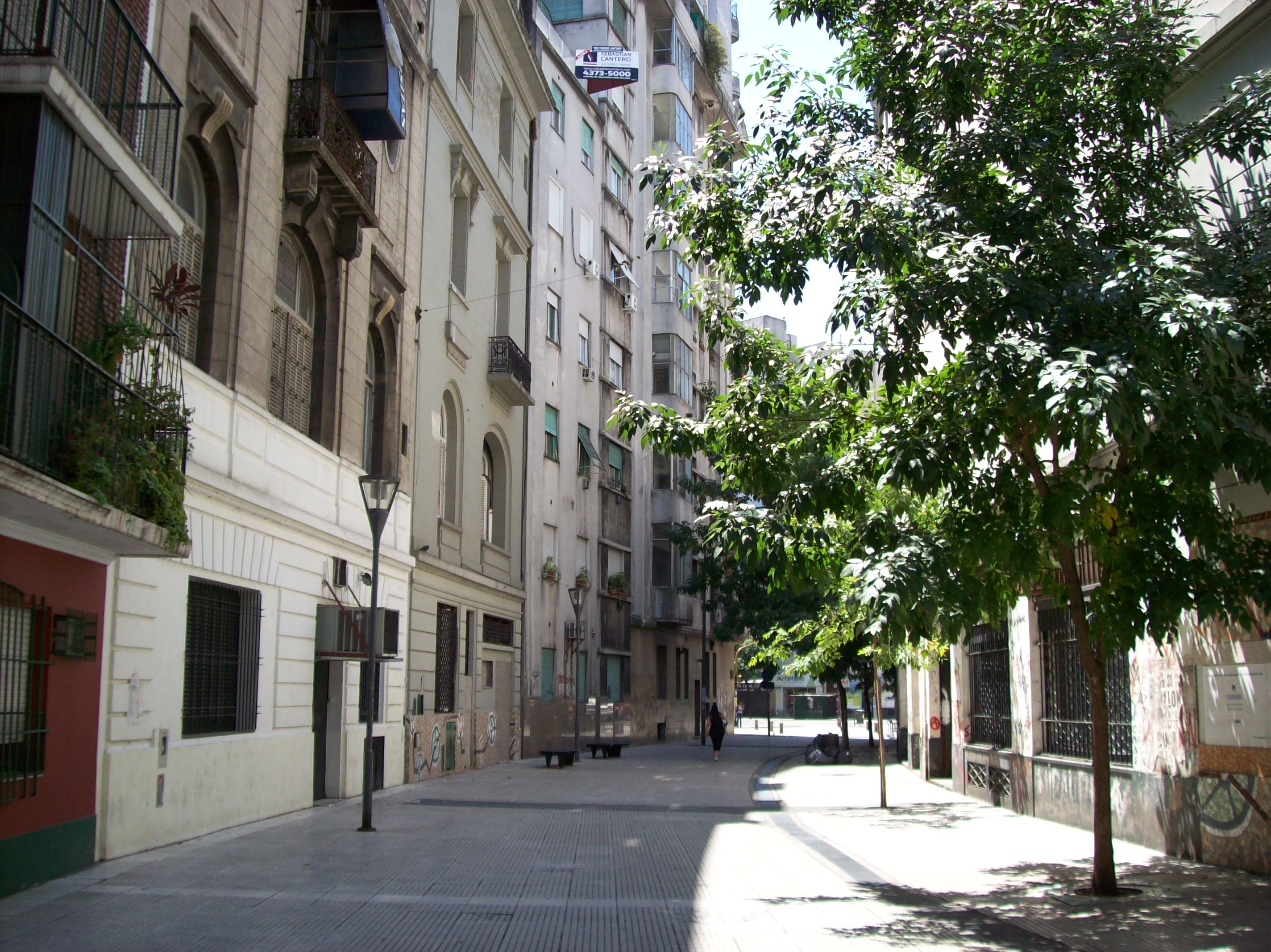 Calle Enrique Santos Discépolo en la Ciudad de Buenos Aires. Al fondo, esquina de Lavalle y Callao.